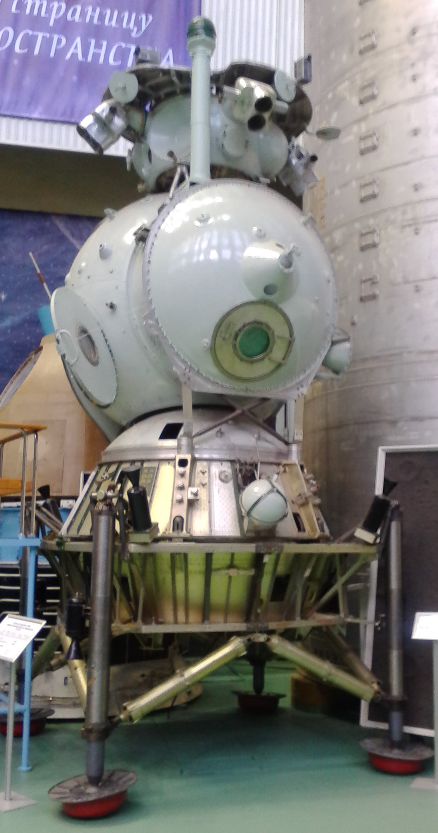 Лунный корабль (ЛК) ракетно-космического комплекса Н1-Л3 в музее ЗАО «ЗЭМ» РКК «Энергия»